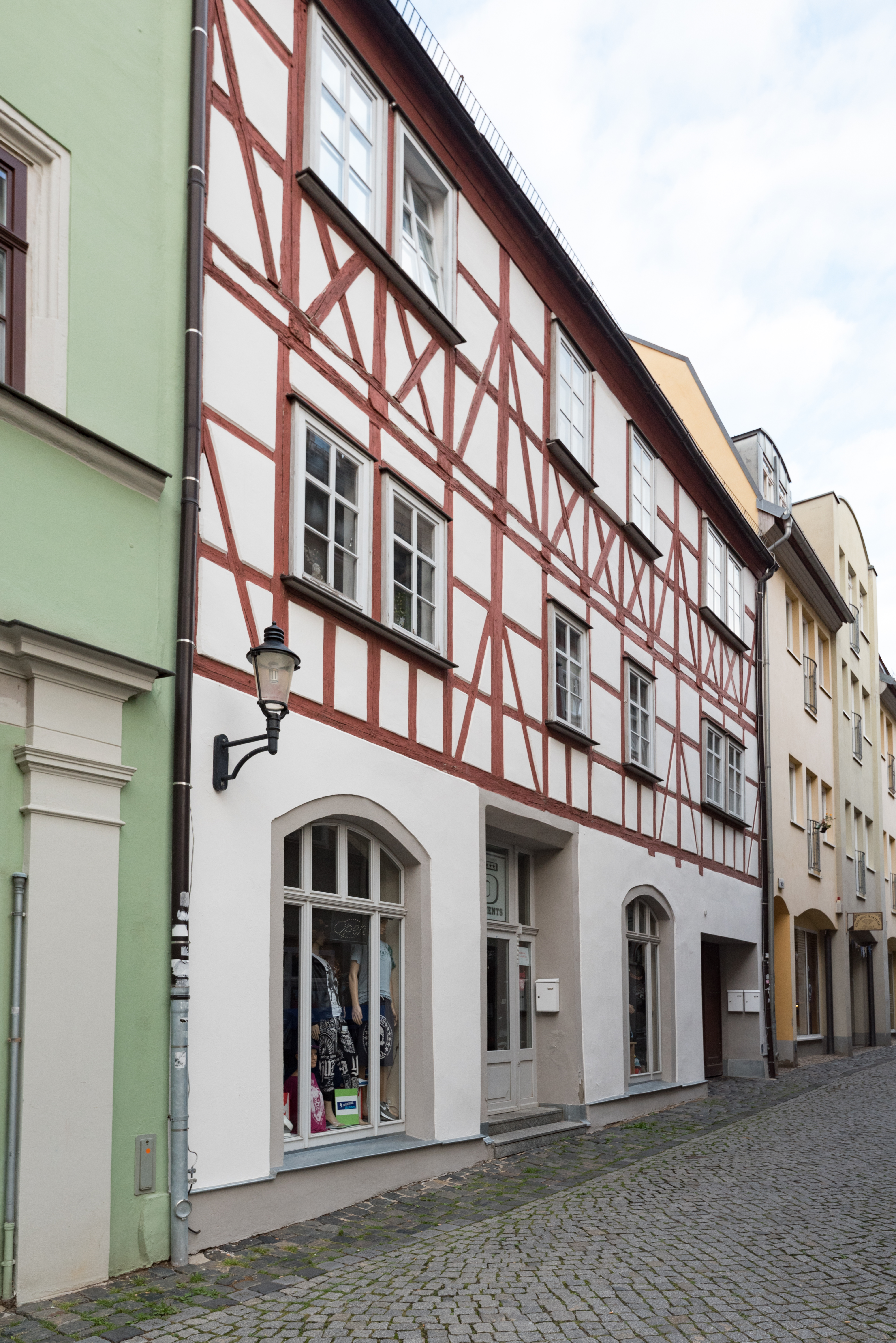 Naumburg (Saale), Engelgasse 19